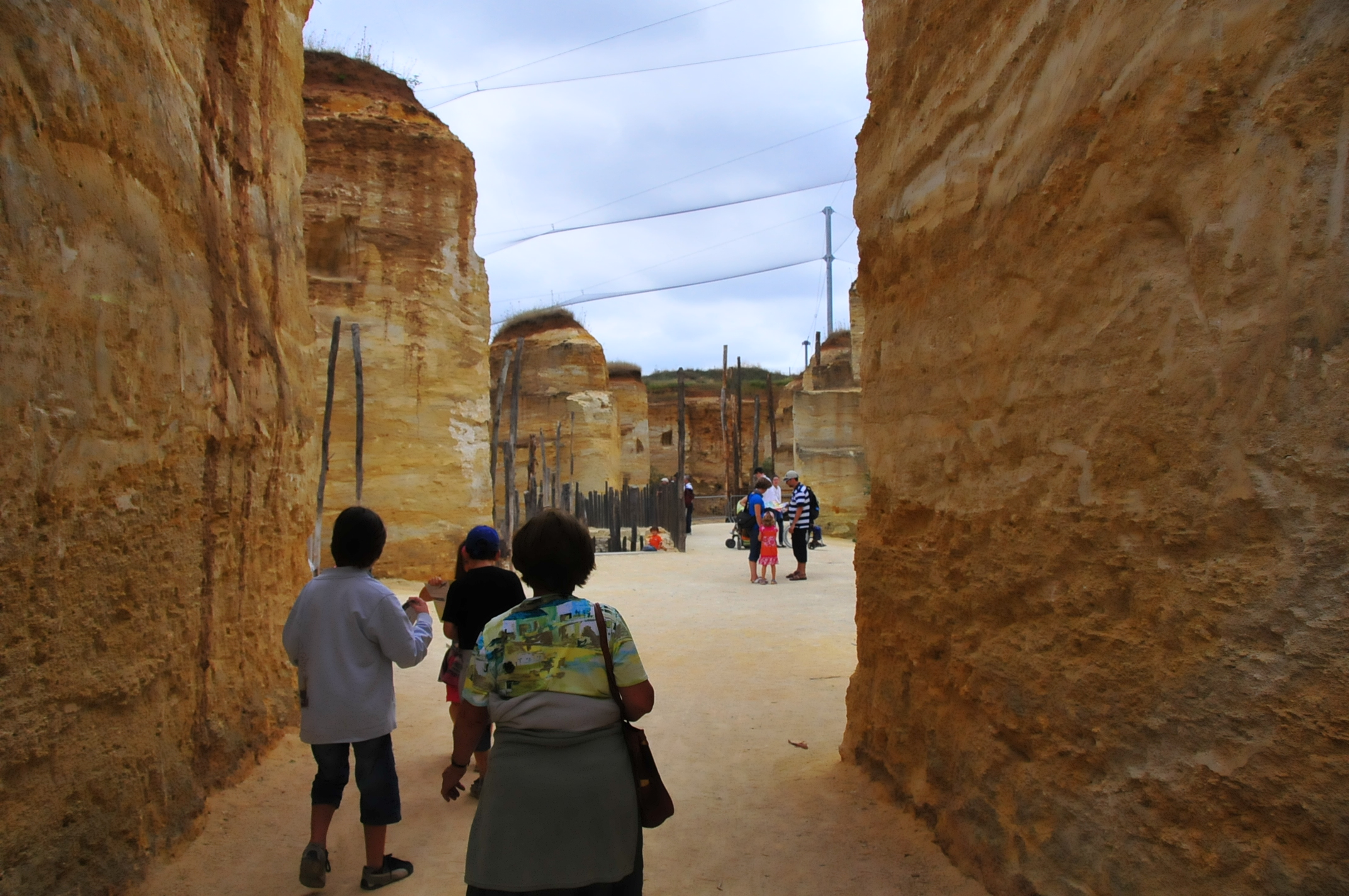 Allée du Bioparc de Doué-la-Fontaine